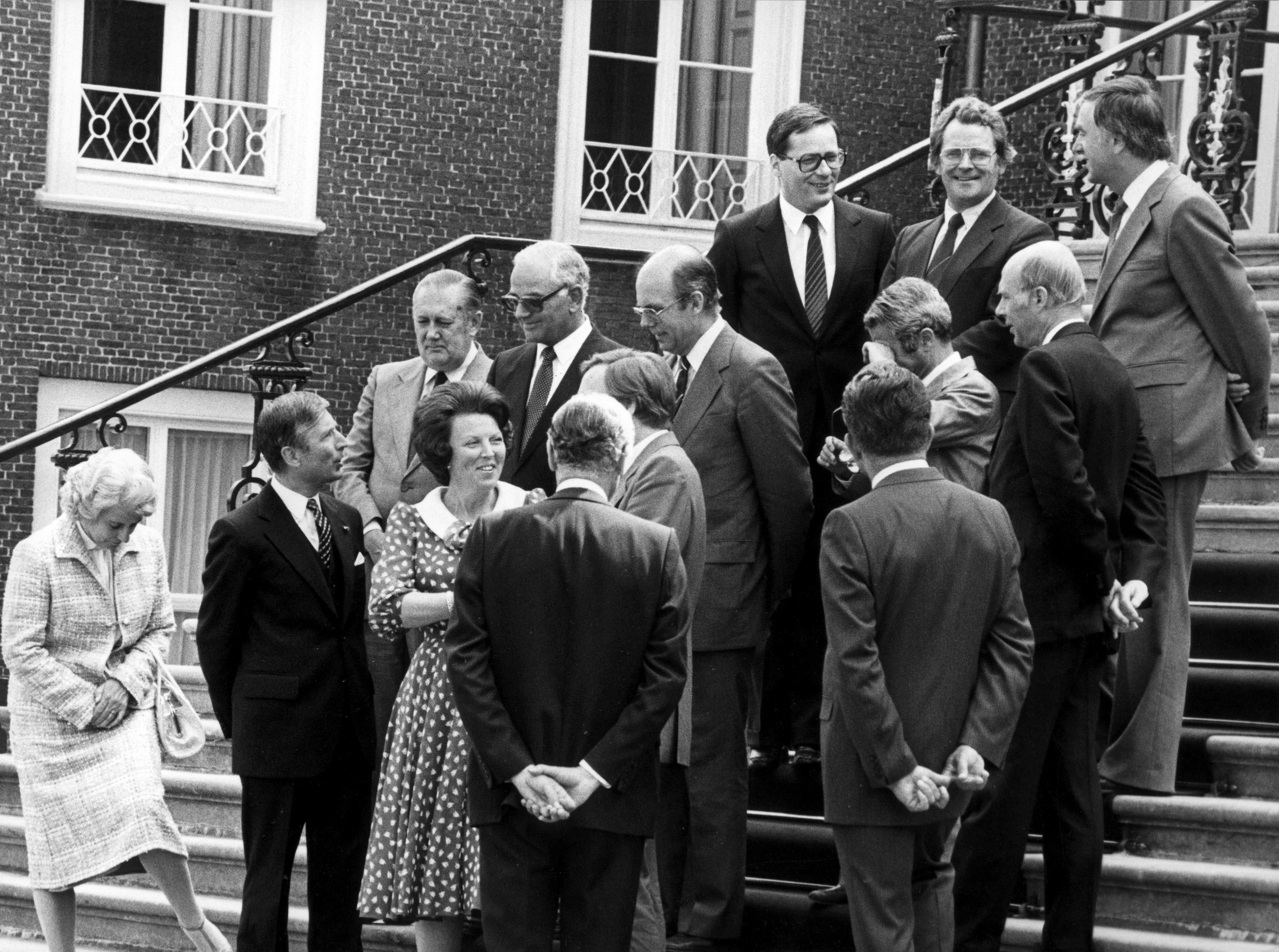 De ministers die deel uitmaken van het derde kabinet Van Agt op de trappen van Paleis Huis ten Bosch in 's-Gravenhage. De koningin beëdigt dit kabinet op 29 mei l982.